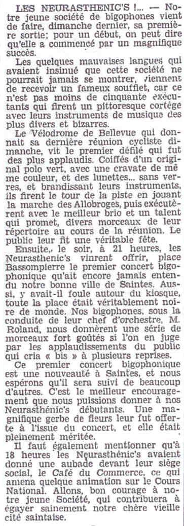 Annonce de la création d'une première société bigophonique à Saintes.